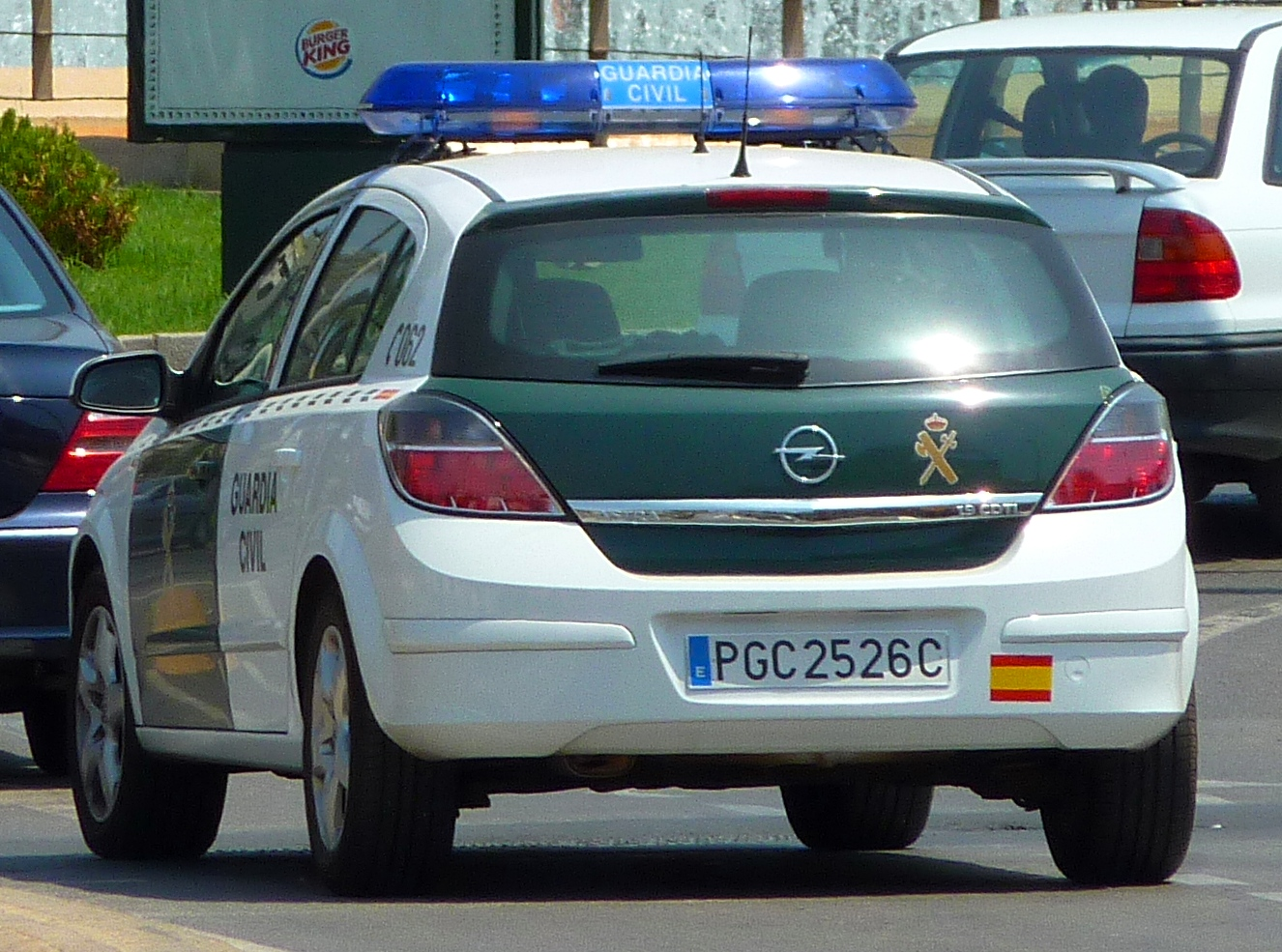 Opel Astra de la Guardia Civil.